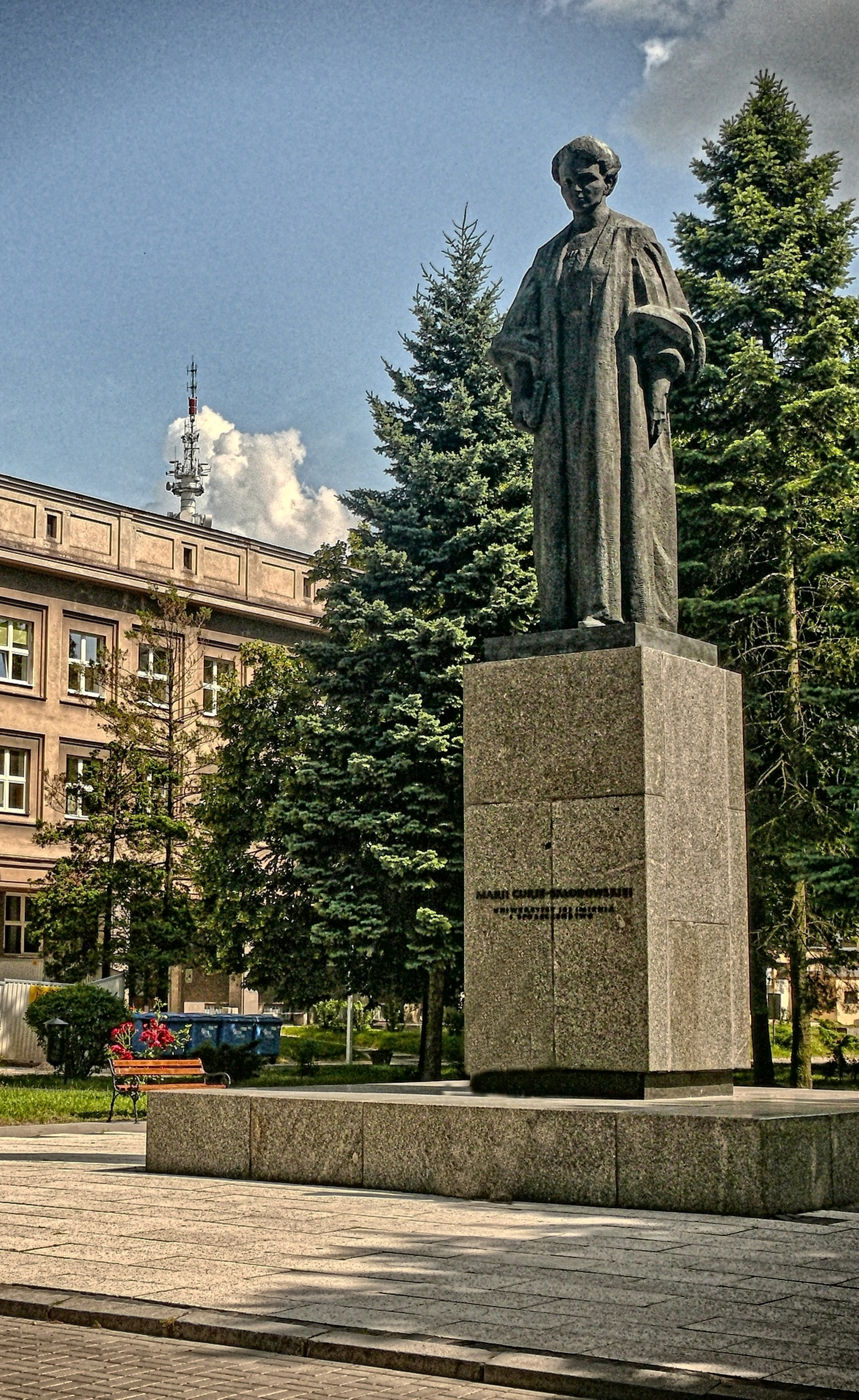 Pomnik Marii Curie-Skłodowskiej, patronki Uniwersytetu w Lublinie, stojący na placu przed Rektoratem.